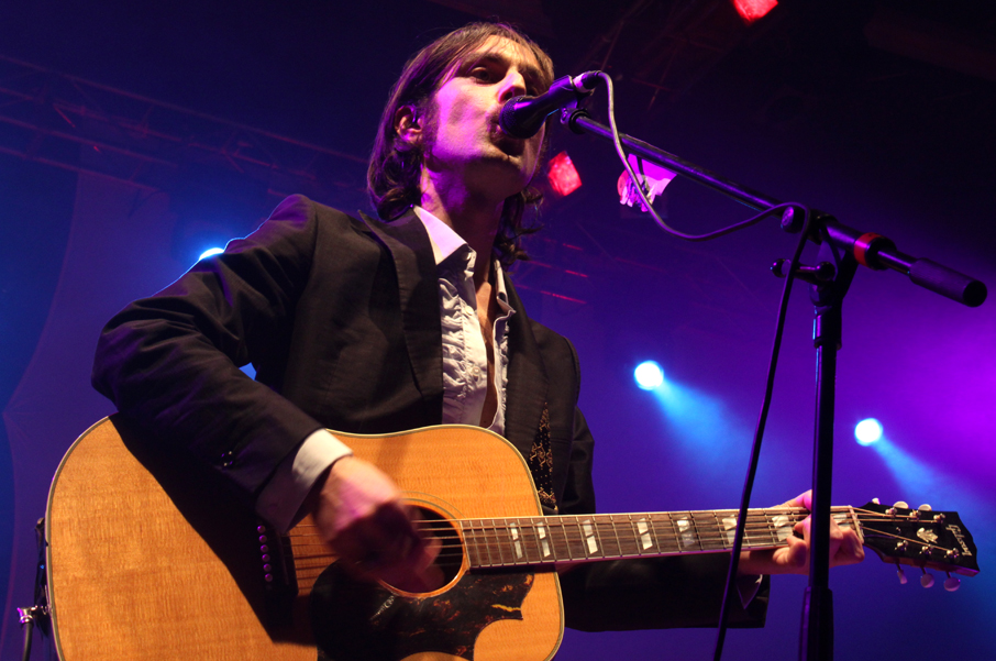 Baustelle